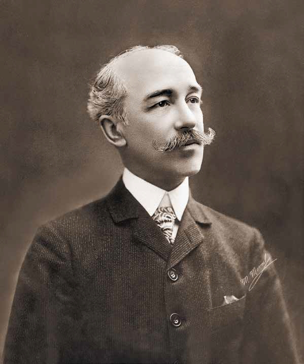 Enrique de la Riva Agüero y Riglos (1857-1930), presidente del Consejo de Ministros y Ministro de Relaciones Exteriores en tres periodos (1897-1898; 1899-1900; 1915-1917).